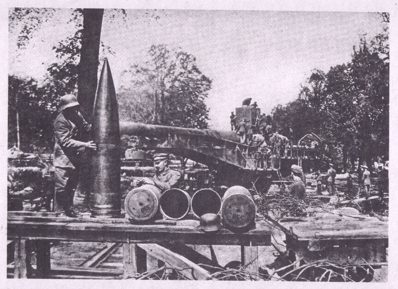 38er Langrohr Granaten